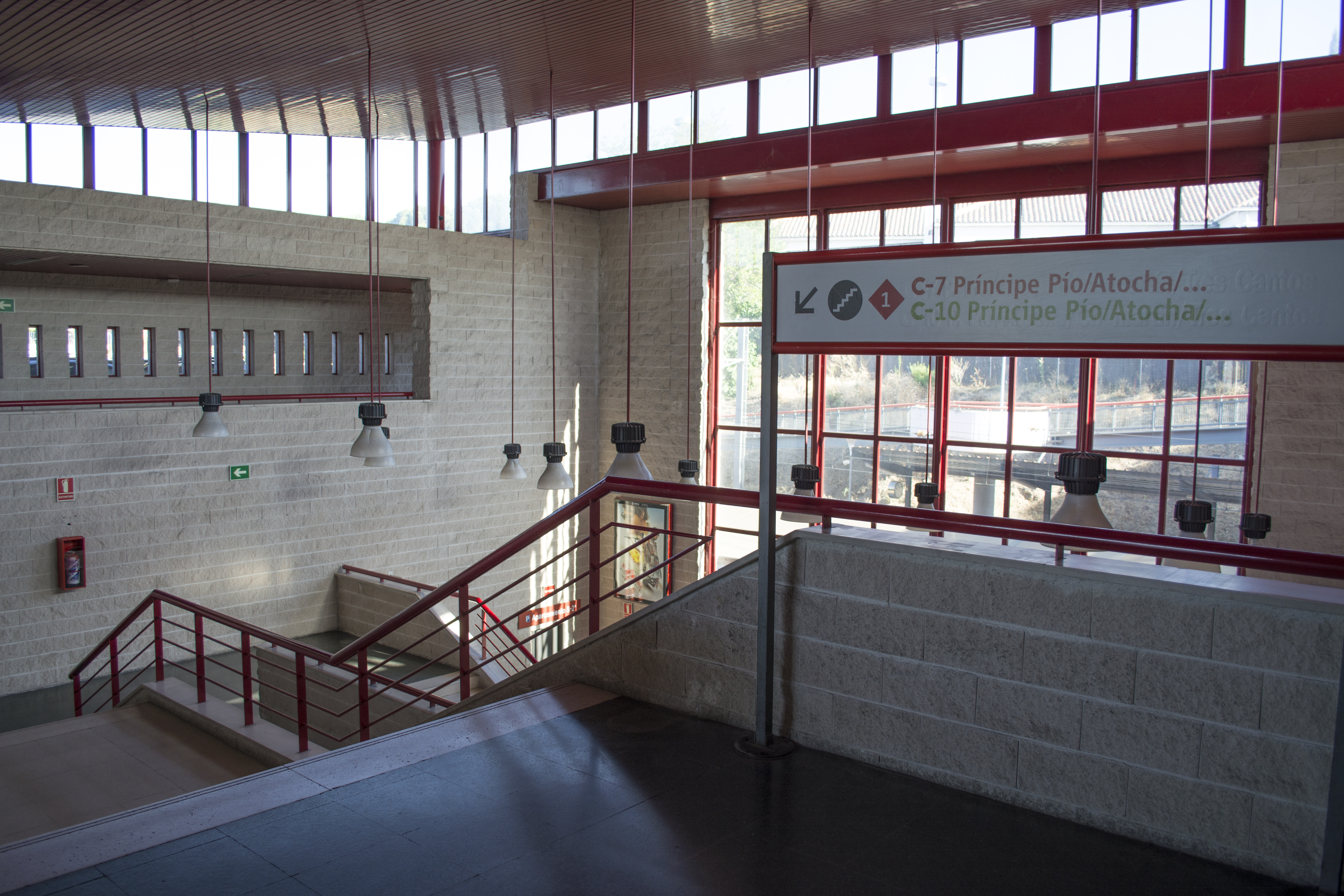 Vestíbulo de la estación El Barrial - Centro Comercial Pozuelo. Las escaleras dan acceso a los trenes que conducen hasta Pozuelo y Madrid; a través de un pasadizo sobre las vías (no visible, a la derecha de la imagen) se toma dirección hacia Majadahonda y Las Rozas.